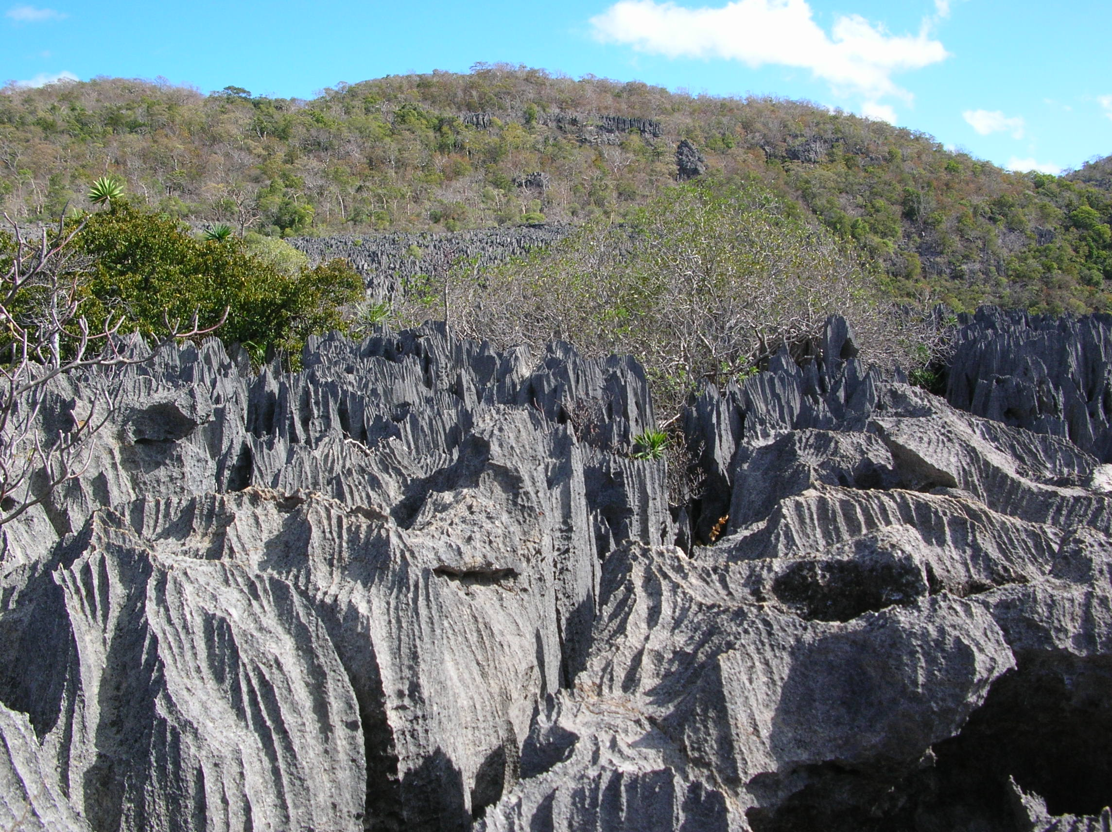 Les grands Tsingy de l'Ankarana, au nord de Madagascar.